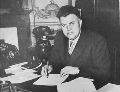 Photo de Marcel Paul au ministère de l'Industrie en 1946.